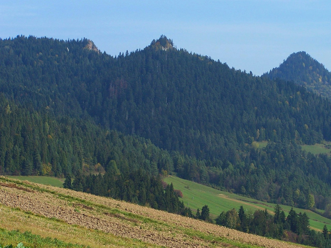 Od lewej:Gumionek, Cyrhlowa Skałka i Nowa Góra. widok z okolic skrzyzowania drogi do Niedzicy i Sromoiec Niżnych